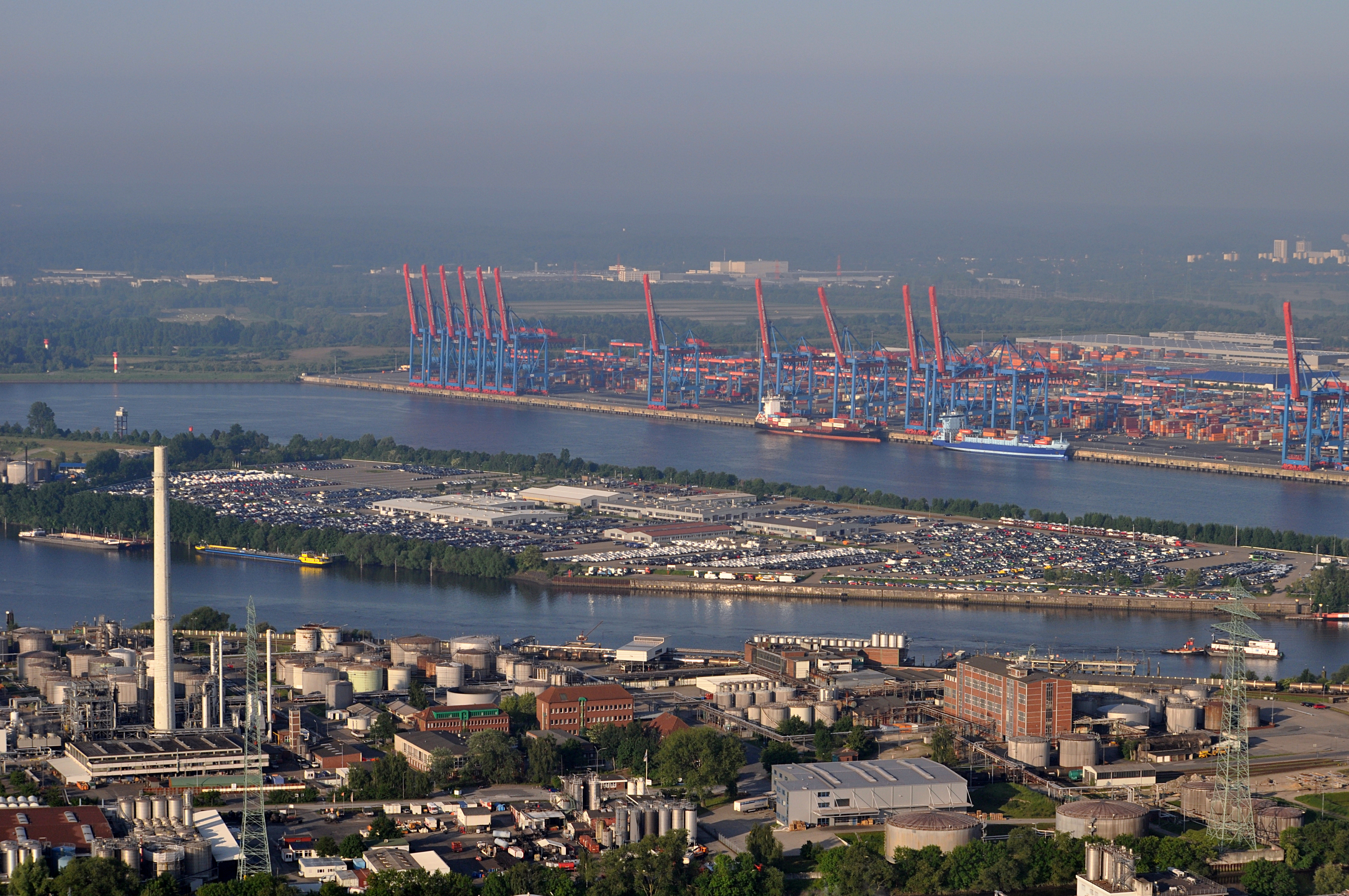 Blick über die Rethe auf die Kattwyk-Halbinsel in Hamburg-Wilhelmsburg, im Hintergrund der Köhlbrand und der Container-Terminal Altenwerder, im Vordergrund die Ölwerke Schindler.